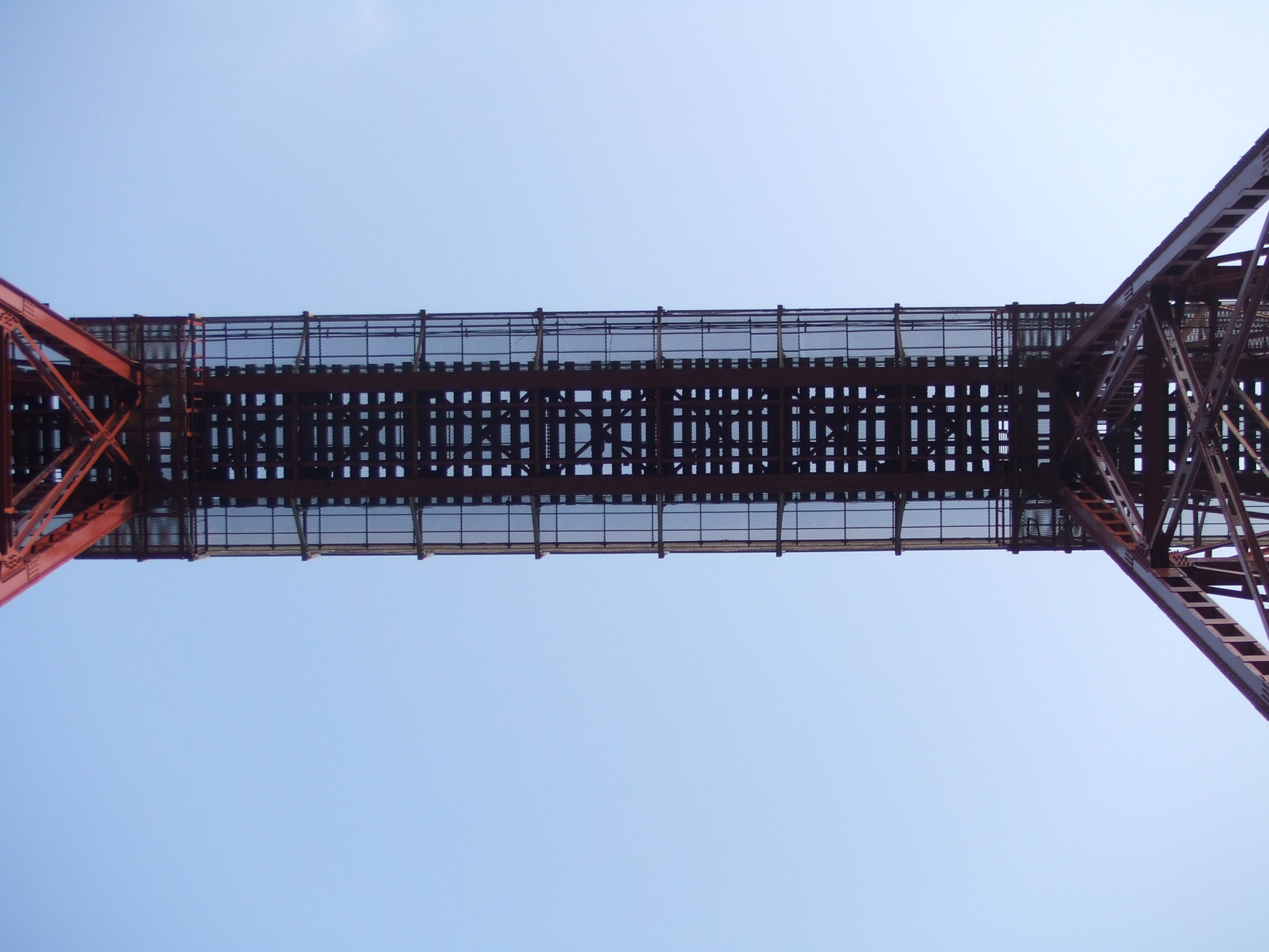 余部橋梁 橋の下からの様子